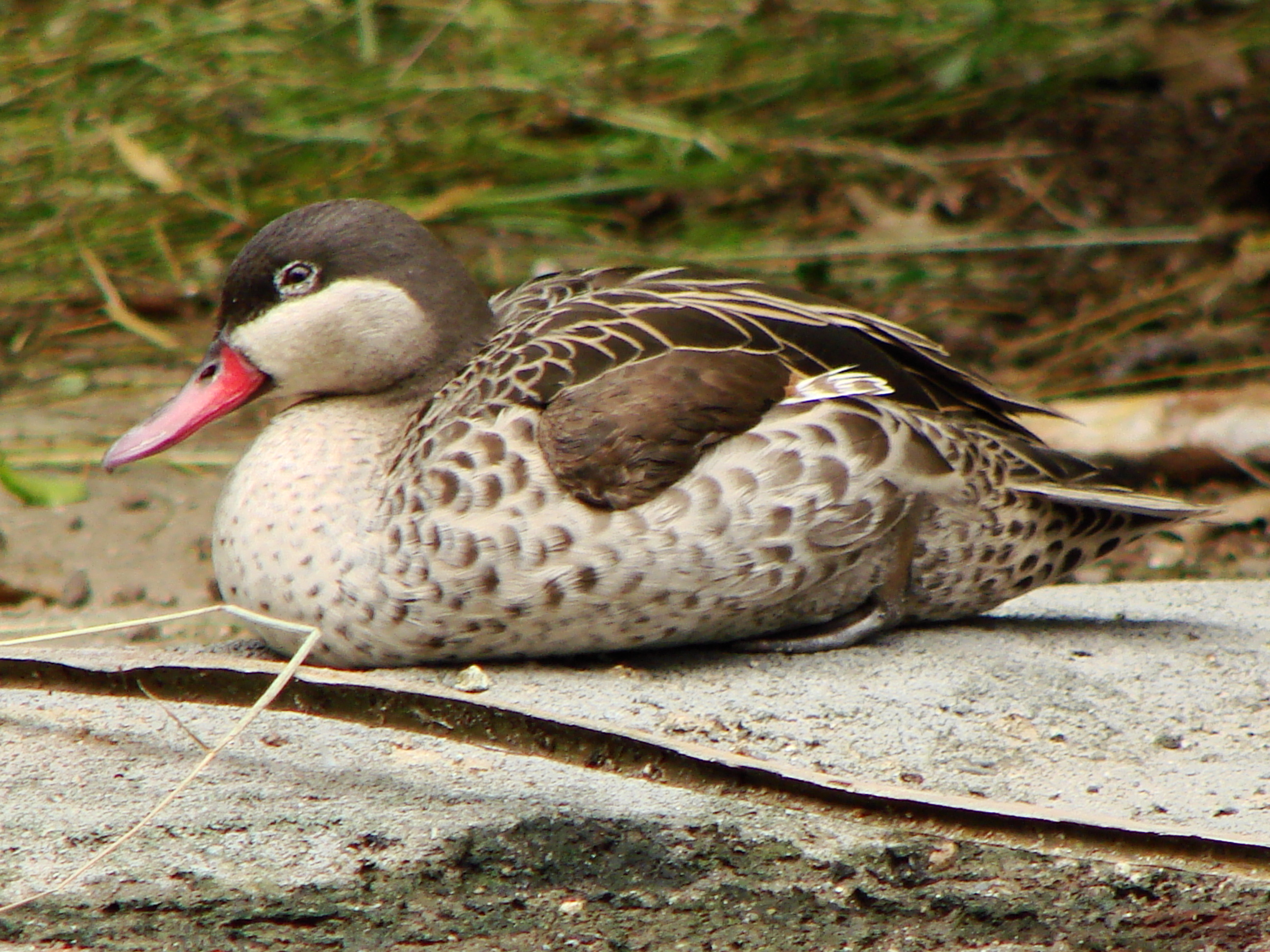 Canard à bec rouge (Anas erythrorhyncha)